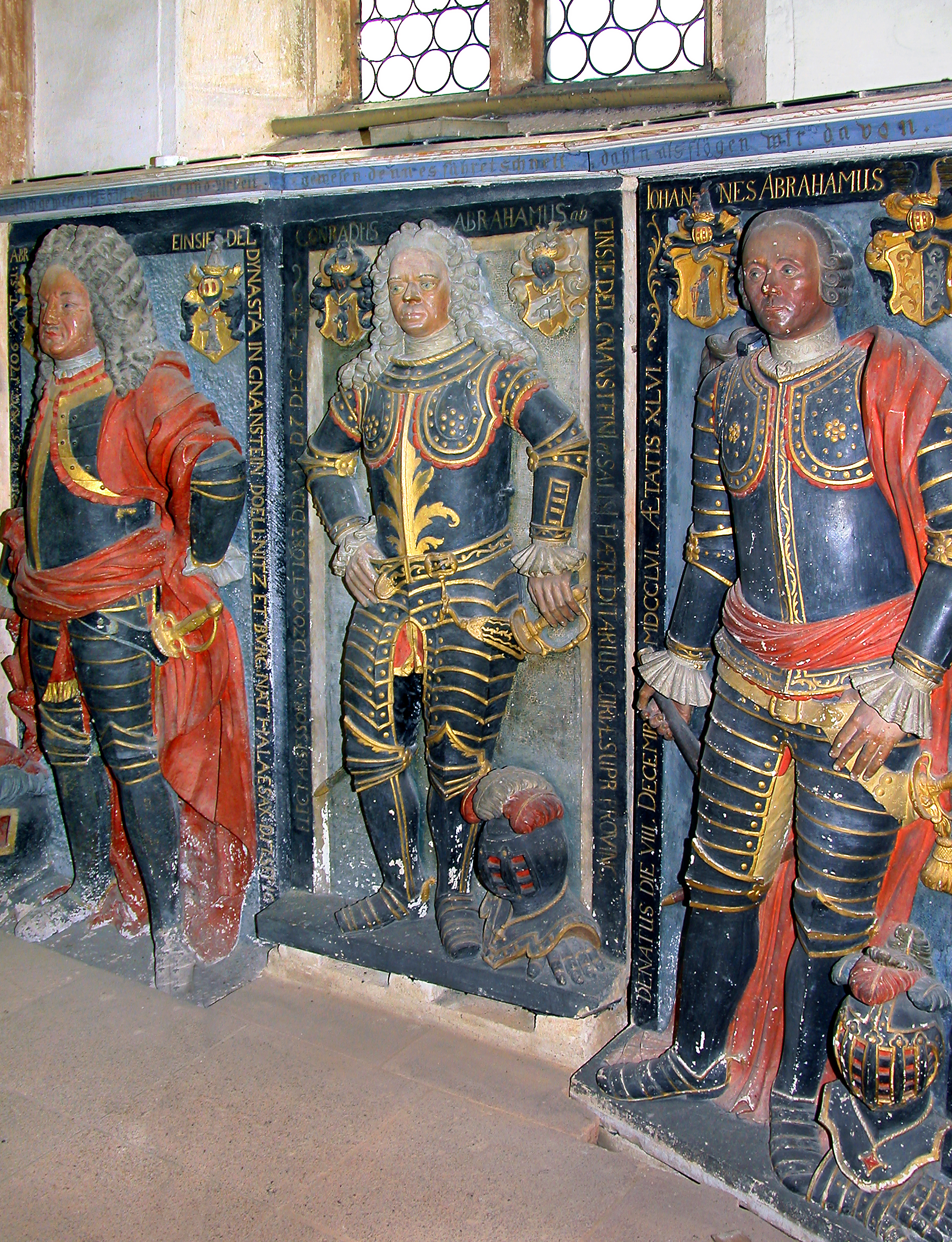 01.09.2009 04654 Gnandstein (Kohren-Sahlis Stadt Frohburg): Dorfkirche (GMP: 51.016505,12.57242) während der Sanierung. Erbaut wurde die Kirche ab 1508 im spätgotischen Stil, nachdem die alte Dorfkirche abgerissen worden war. In der Kirche befindet sich die Ahnengalerie der Gnandsteiner Burgherren, die seit dem Mittelalter eng mit der Herrschaft über Kohren und Wolftitz verbunden waren. Die gotische Kirche diente über 300 Jahre dem Geschlecht derer von Einsiedel als Begräbnisstätte. Hier die Epitaphe im Chorumgang rechts. [DSCN38669.TIF]20090901020DR.JPG(c)Blobelt